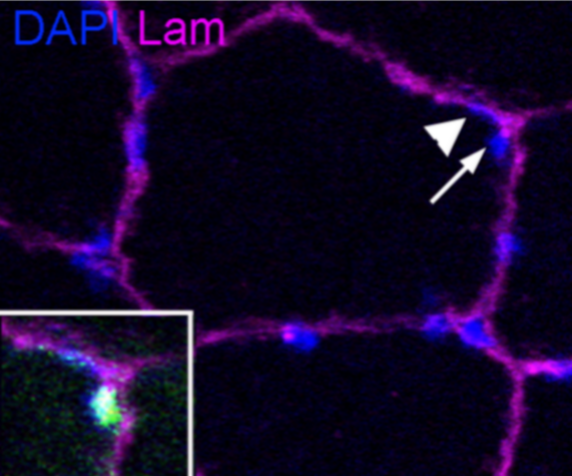 Figura 2. Caracterización de la expresión de Bmi1 en el músculo esquelético humano. En el músculo esquelético adulto. La expresión Bmi1 se co-localiza con la expresión Pax7 (flecha y recuadro). La expresión débil de Bmi1 también se ve en los mionúcleos de las fibras musculares identificadas por su posición sublaminar y la ausencia de positividad de Pax7 (punta de flecha). La lámina basal se identifica mediante el etiquetado de la proteína laminina (Lam).